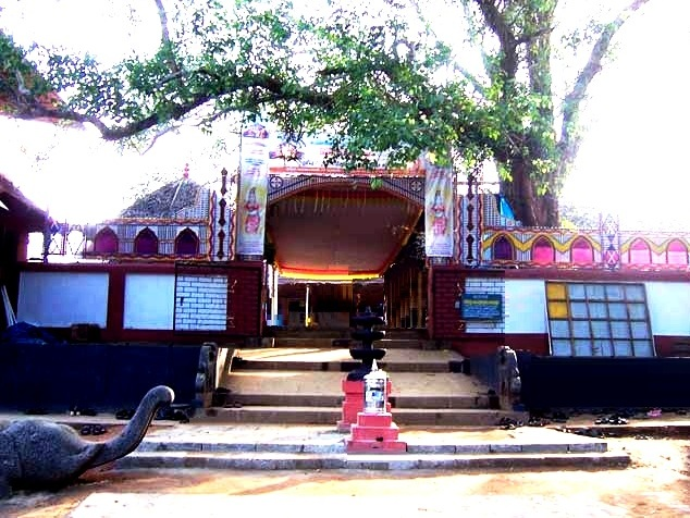 ചൊവ്വല്ലൂർ ശിവക്ഷേത്രം